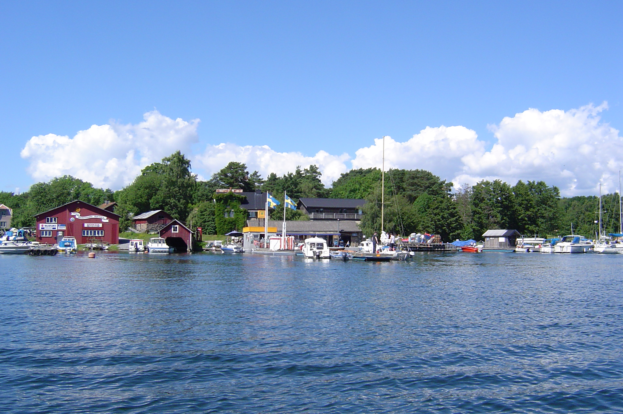 Fladen på Norra Stavsudda